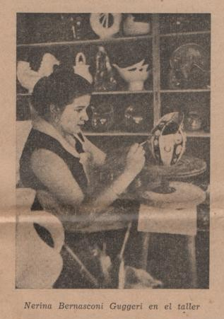 Nerina Bernasconi Guggeri en su taller de cerámica